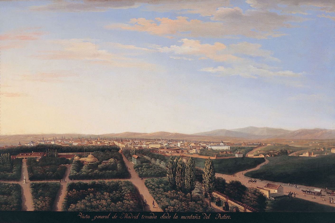 "Vista general de Madrid desde la montaña del Retiro". Grabado coloreado del Museo de Historia de Madrid. Pertenece a la serie "Vistas de los Sitios Reales y Madrid", que el rey Fernando VII de España le encargó all pintor Fernando Brambila hacia 1830